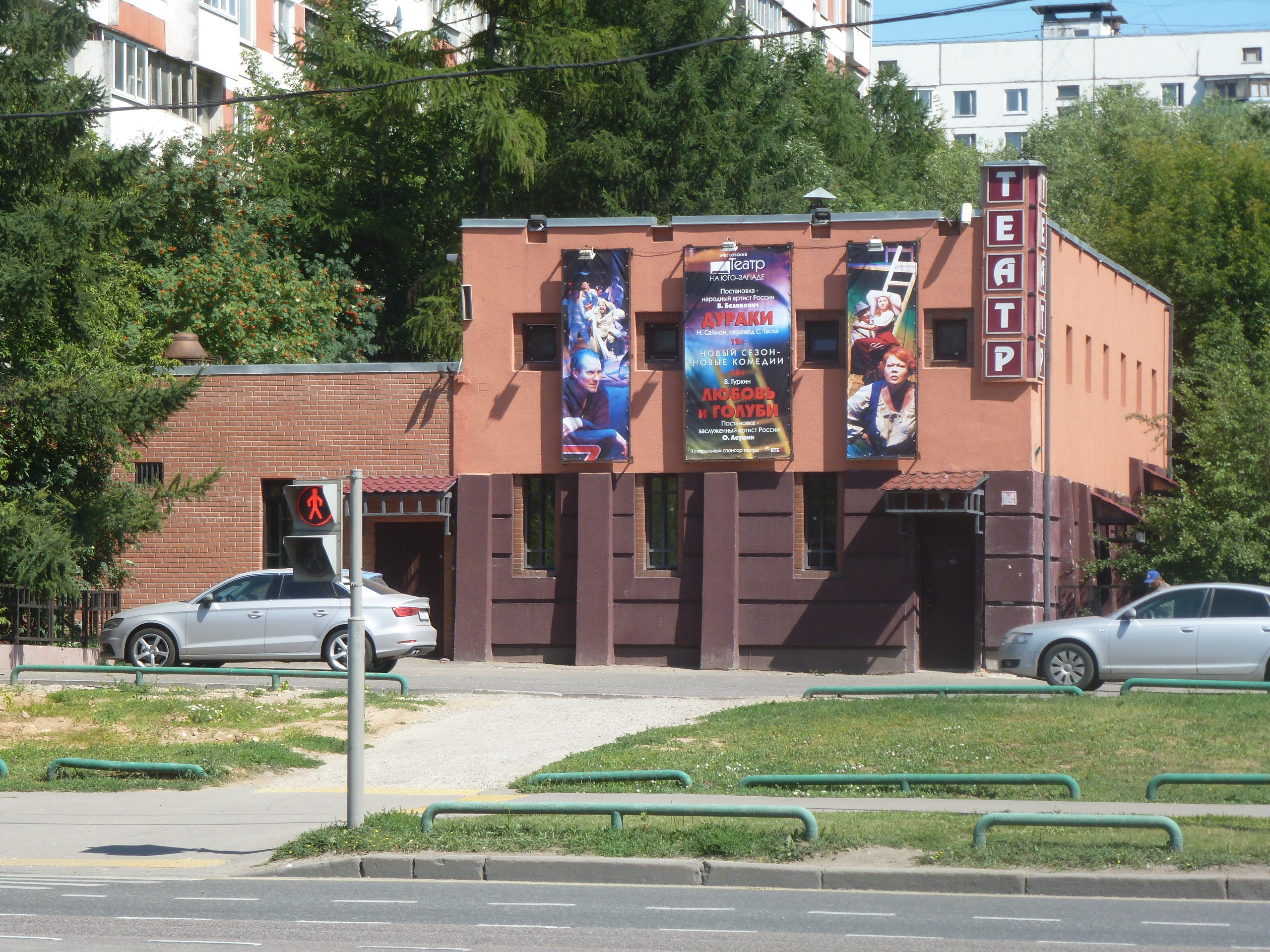 Teatro "Na Jugo-Zapade" ("Sud-Okcidente") en Moskvo, Rusio